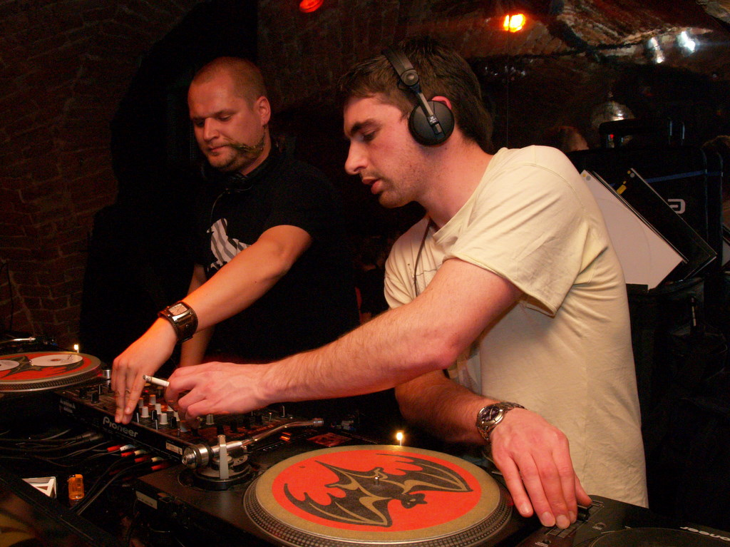 German DJ/producer duo Boogie Pimps performing at Prinzzclub Magdeburg, 2007Prinzzclub Sunny mit Boogie Pimps 51